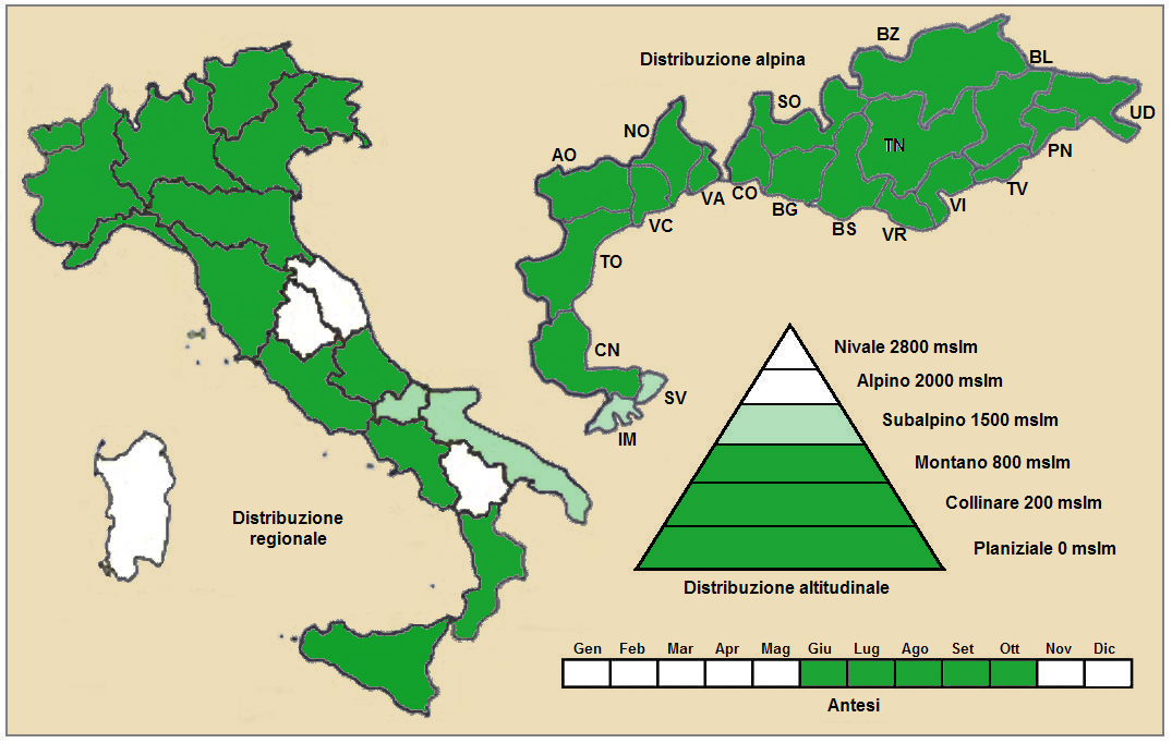 Mentha arvensis - Distribuzione